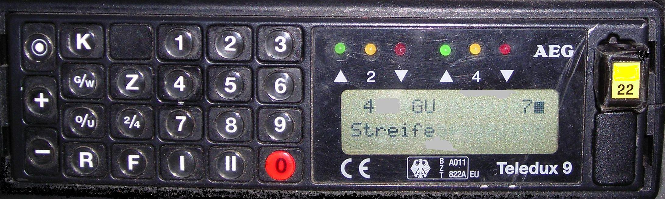 Bedieneinheit eines Funkgerätes: AEG (Allgemeine Elektricitäts-Gesellschaft) — Teledux 9 für BOS-Funk mit Funkmeldesystem-Unterstützung (2- und 4-Meter-Band)